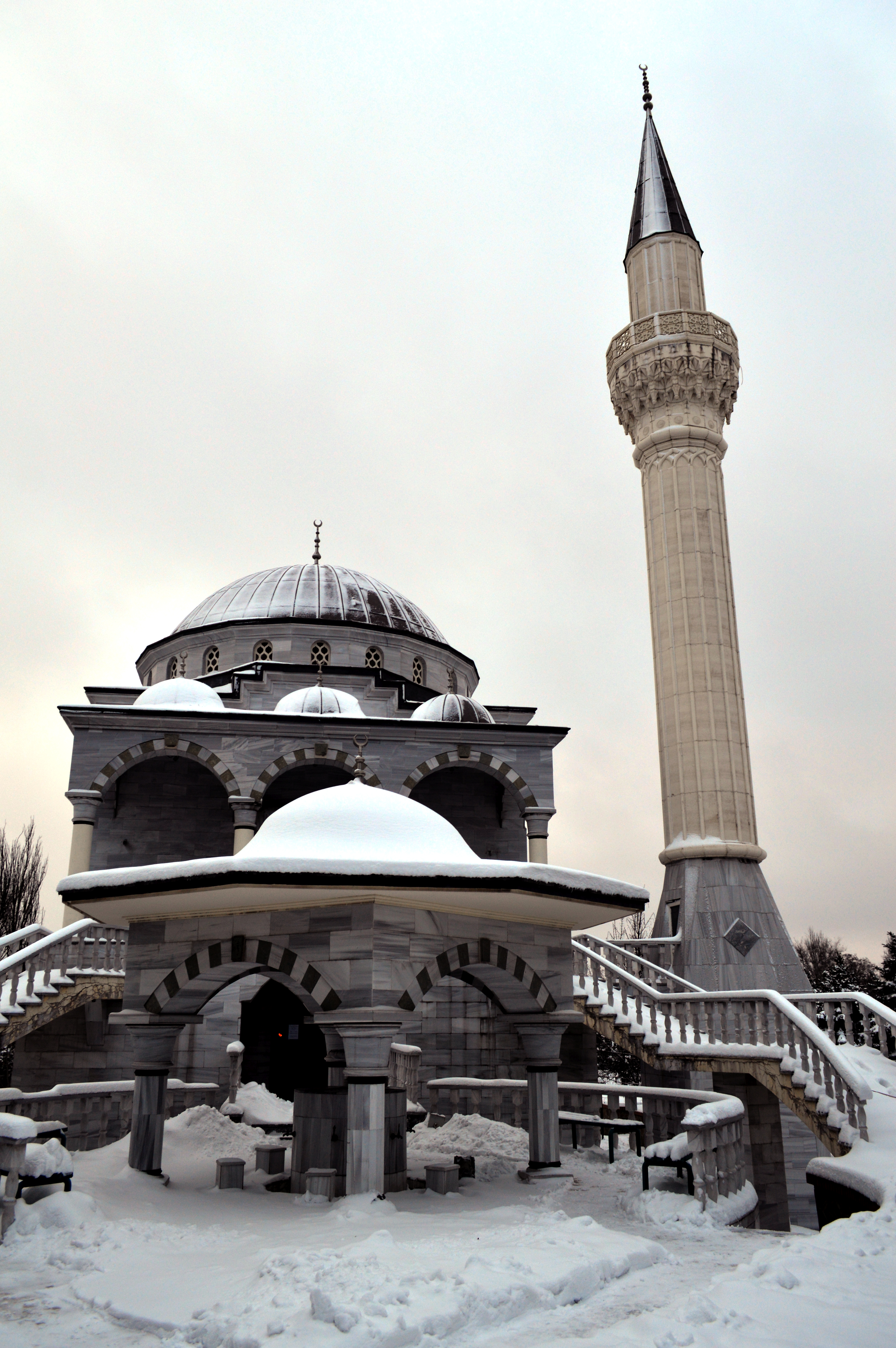 Маріупольська мечеть взимку